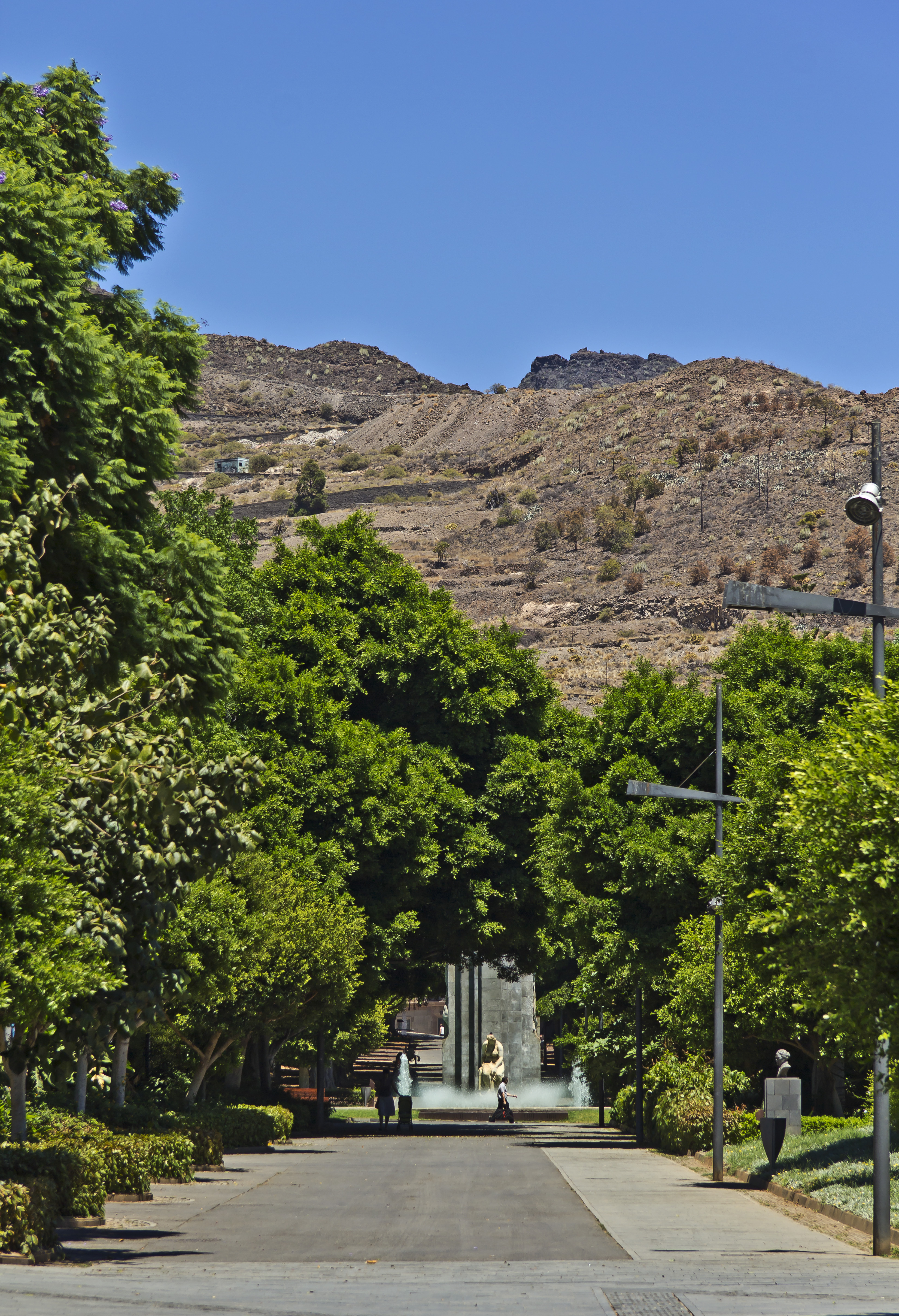 Der Paseo Francisco Borges Salas am Südeingang des Parque García Sanabria in Santa Cruz de Tenerife; im Hintergrund sind die Ausläufer des Anagagebirges erkennbar